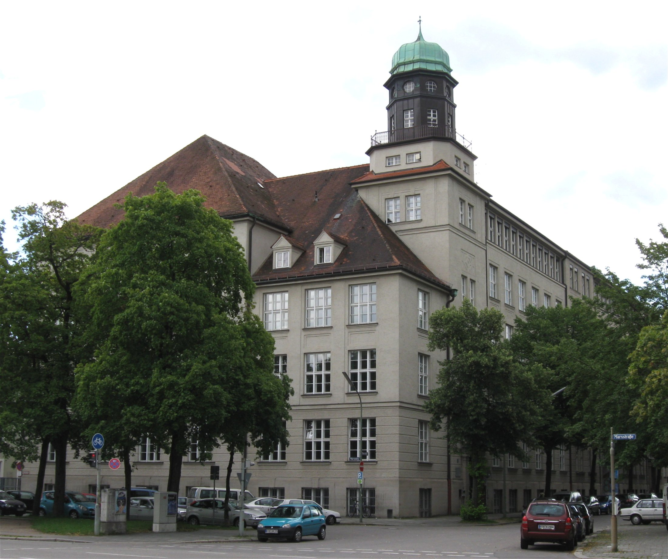 Berufliches Schulzentrum an der Deroystr., München